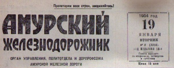 Дорожная газета Амурской железной дороги с 1936 по1959 годы